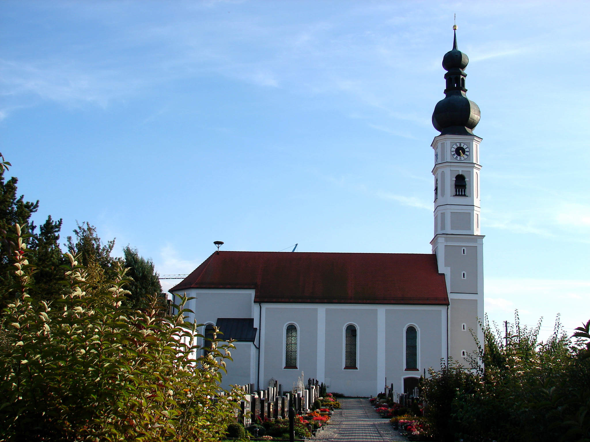 Pfarrkirche Mariä Unbefleckte Empfängnis